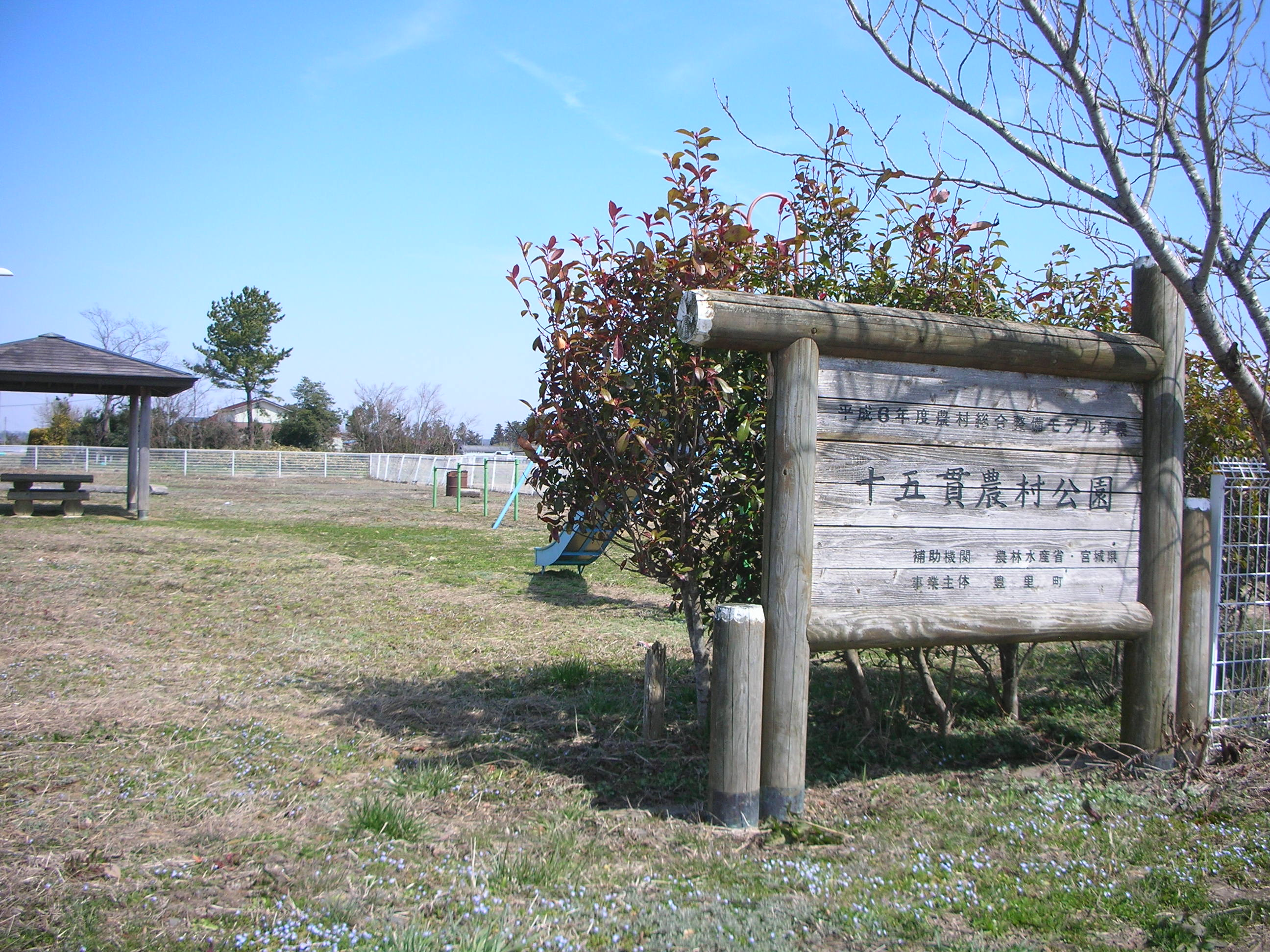 十五貫農村公園